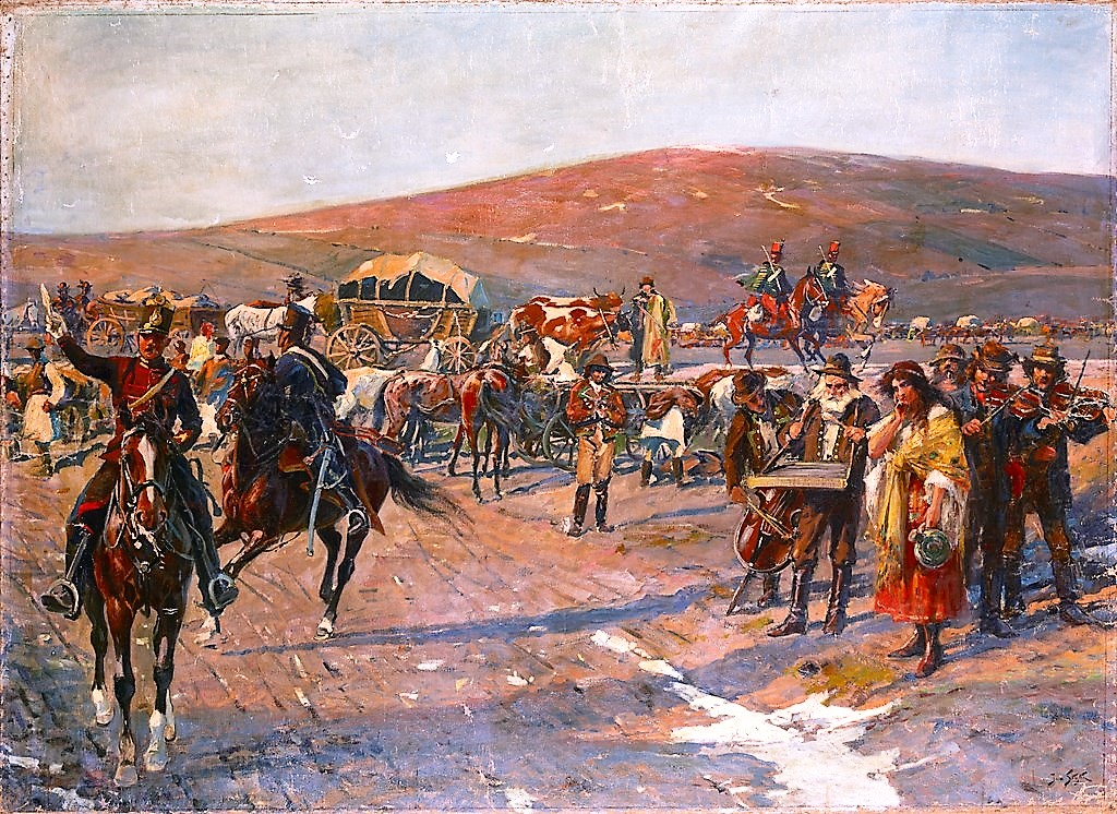 Jan Styka Panorama Siedmiogrodzka i Jan Lebenstein